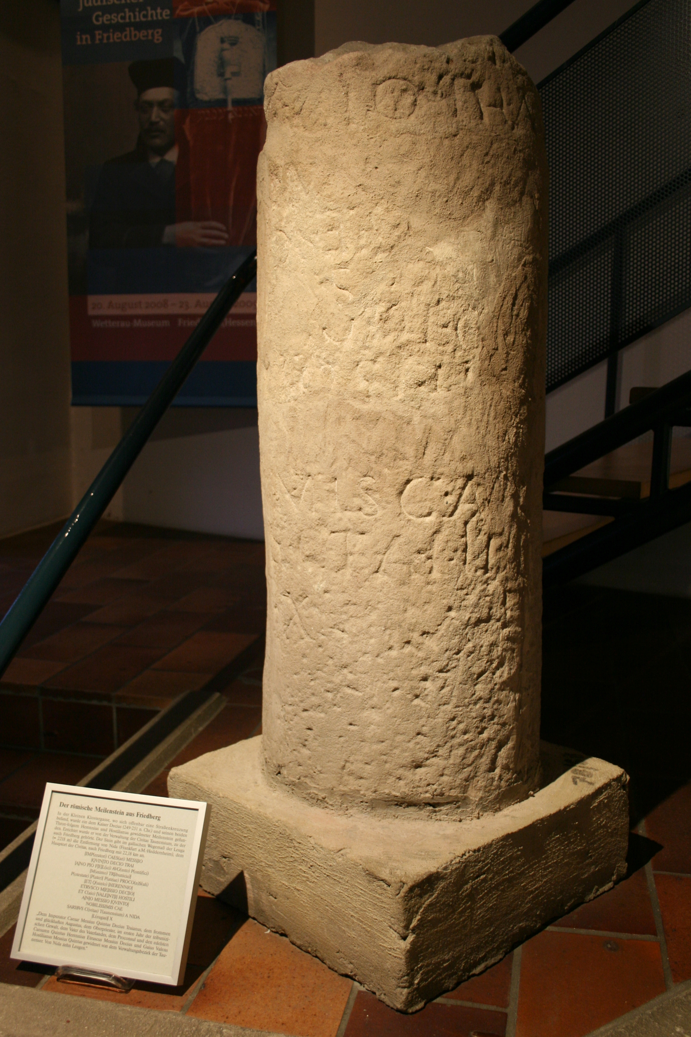 Leugenstein aus Friedberg, Hessen (CIL XIII, 09123), im Wetterau-Museum. Mit freundlicher Genehmigung des Museums.